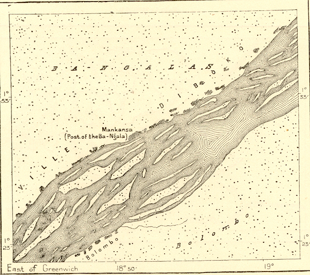 map of Makanza around 1890